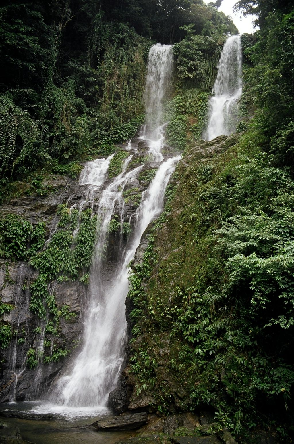 Tagalog: Ang Talon ng Tamaraw sa Pilipinas.